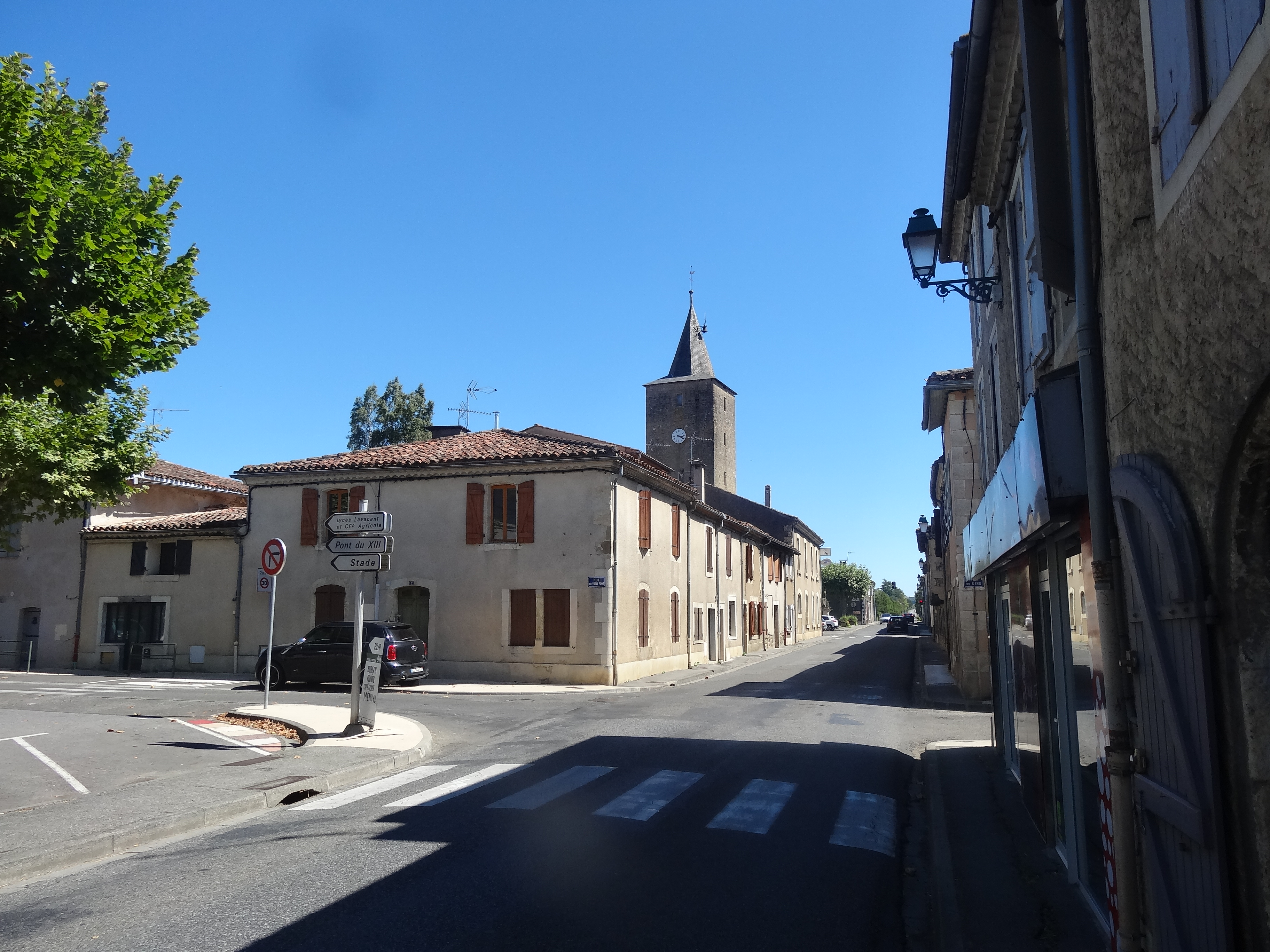 Pavie et son église.